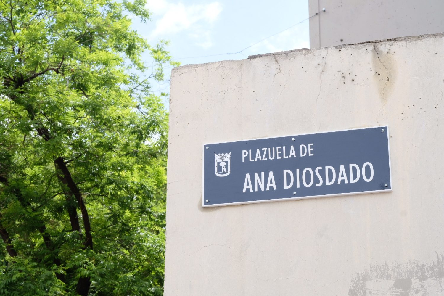 La dramaturga, actriz y escritora Ana Diosdado (Buenos Aires 1938 – Madrid 2015) da nombre desde hoy, lunes 28 de mayo, a una plaza situada en el barrio de Lavapiés, en el espacio situado entre las calles de Argumosa y Valencia, frente al Teatro Valle-Inclán, una de las sedes del Centro Dramático Nacional. Este mediodía, la alcaldesa de Madrid, Manuela Carmena; el ministro de Educación, Cultura y Deporte, Íñigo Méndez de Vigo; el director del Centro Dramático Nacional (CDN), Ernesto Caballero, y el presidente de la Sociedad General de Autores y Editores, José Miguel Fernández Sastrón, han descubierto la placa con el nombre de la plaza.